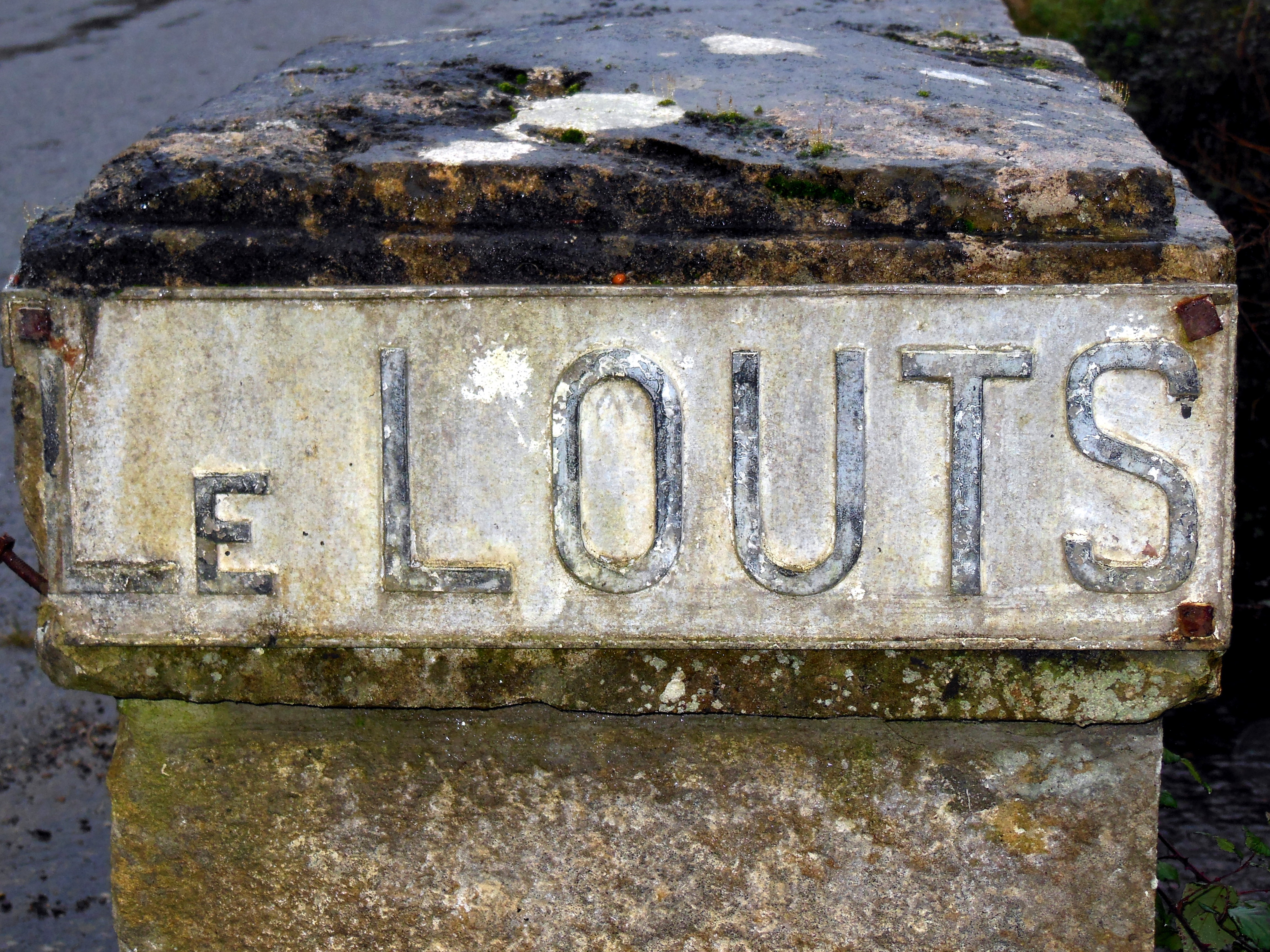 Le Louts à Saint-Cricq-Chalosse (Landes, France)